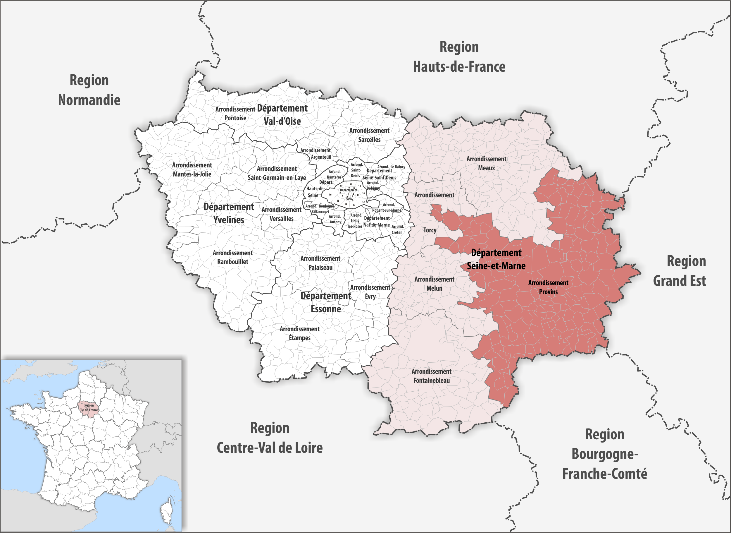 Lage des Arrondissements Provins